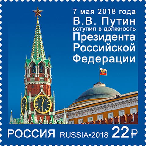 Почтовая марка, посвященная инаугурации президента РФ Владимира Путина